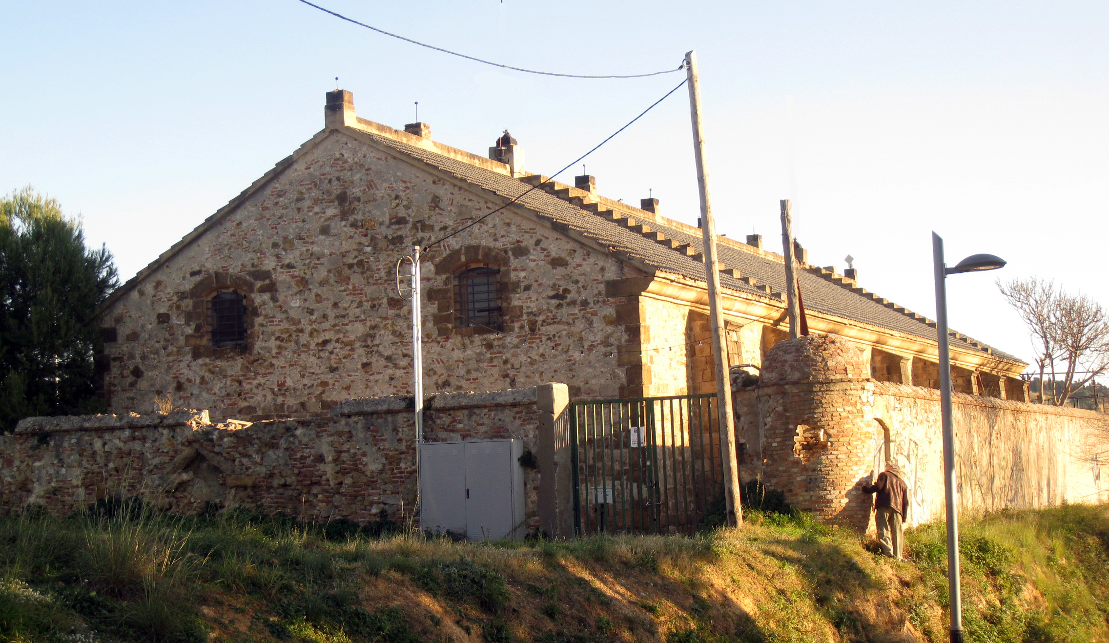 Polvorí de Montjuïc (Barcelona), obra de 1773.